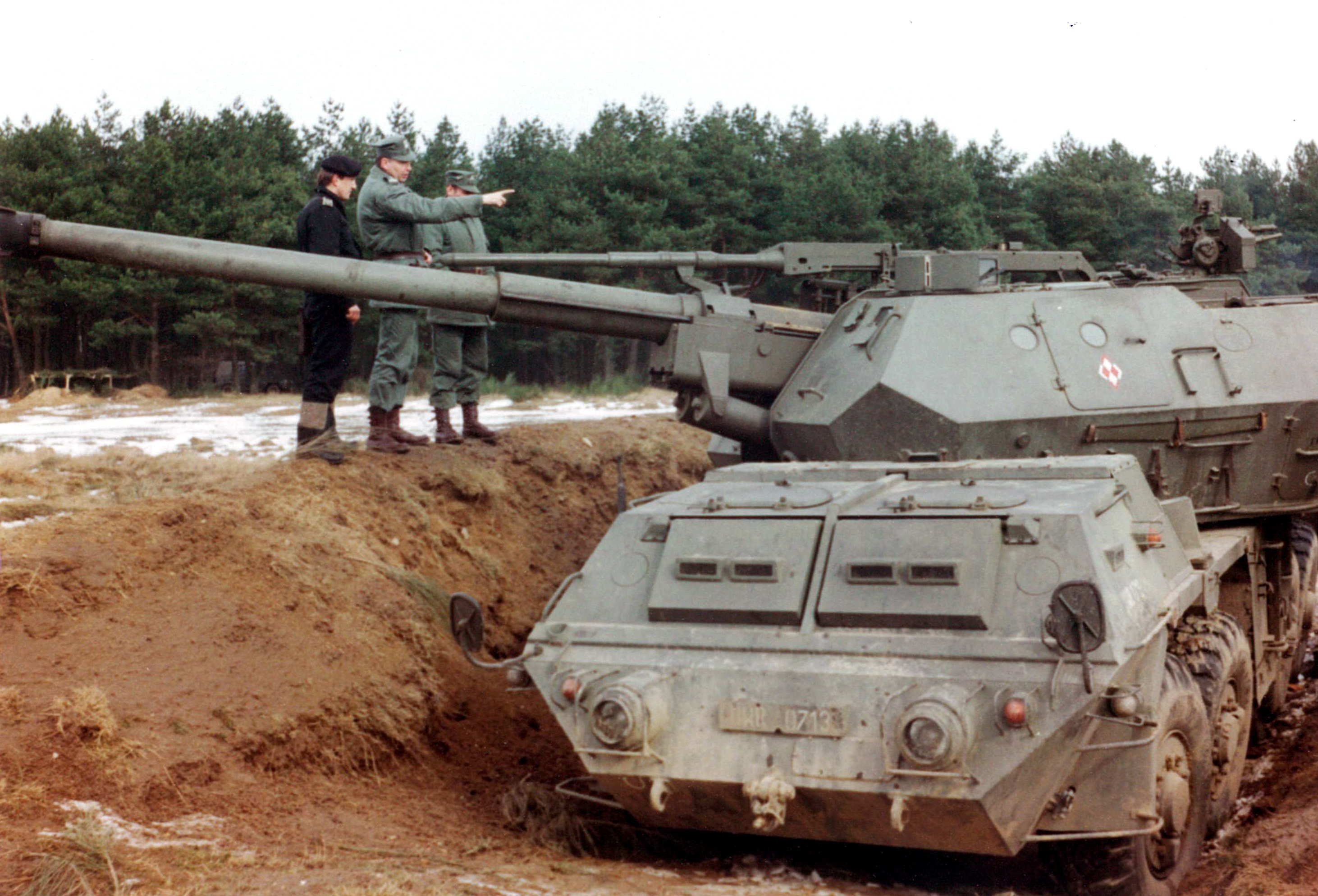 Dana 2 pa ze Szczecina na stanowisku ogniowym